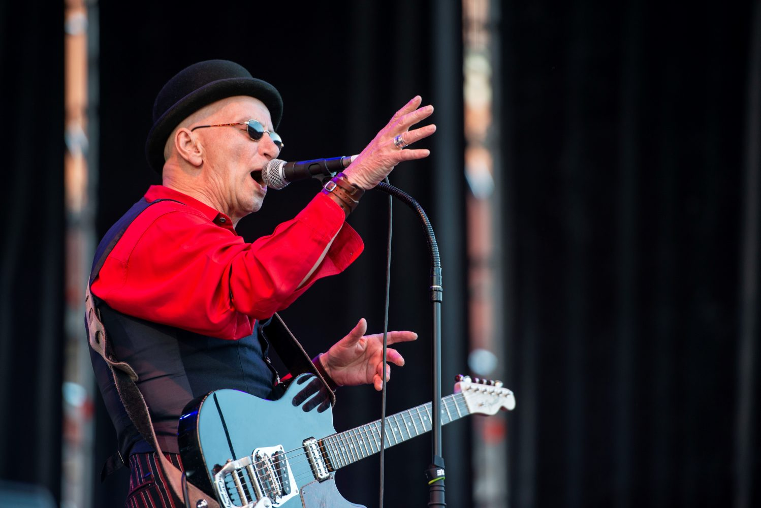 Ayer, lunes 14 de mayo, la Plaza Mayor celebró los 25 años de M80 con un concierto que recogió buena parte de la escena del rock nacional más popular. En Las Visitillas tomaban el relevo los sonidos más alternativos, mientras que el parque de Tierno Galván se iluminó a la luz de los fuegos artificiales en honor del ‘viejo profesor’. Una tarde-noche llena de música y color para unas fiestas que congregan cada día a miles de personas.